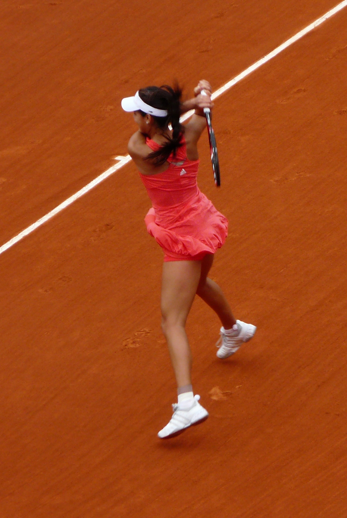 Ana Ivanovic en quart de finale à Roland Garros 2008.